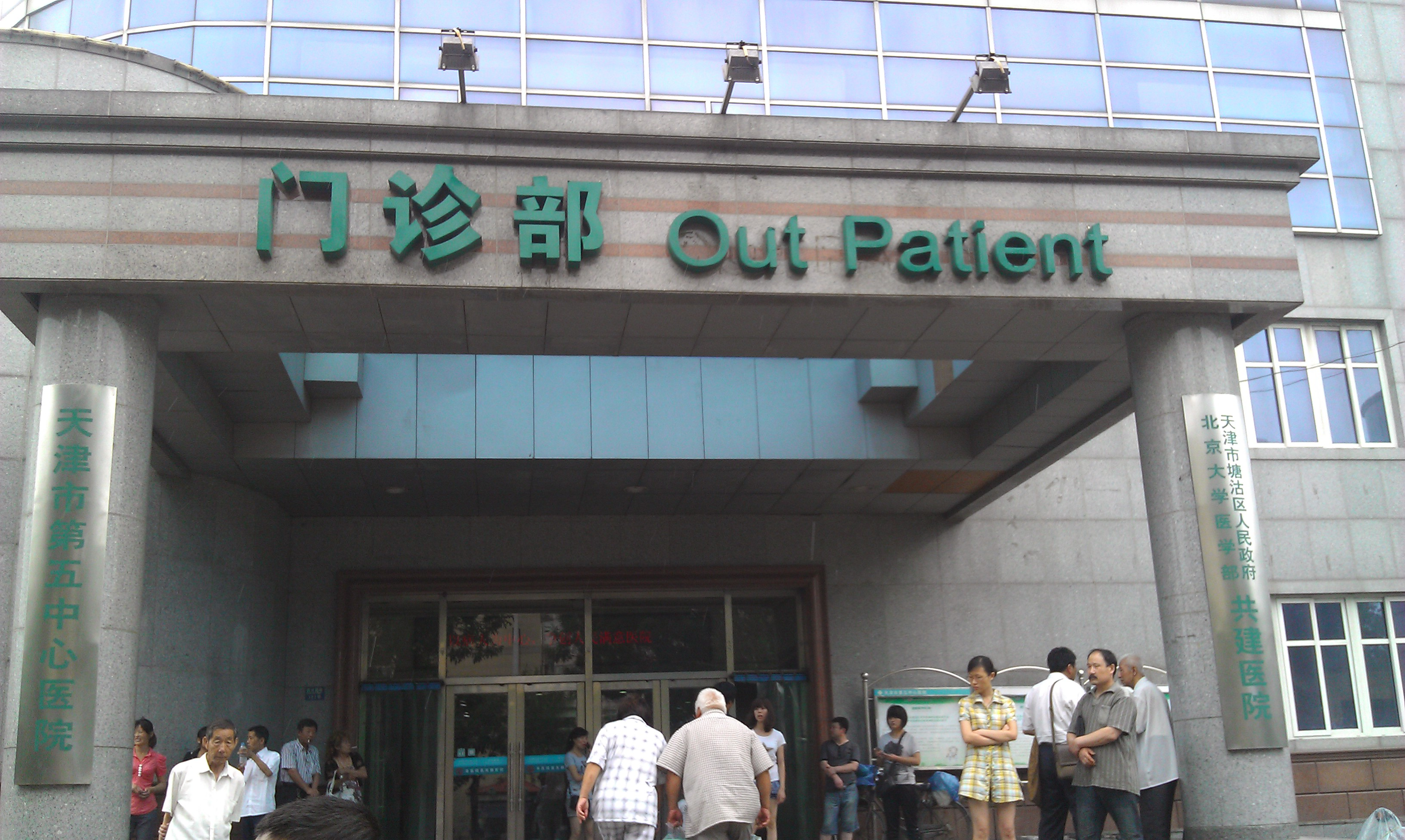 天津第五中心医院门诊部大门